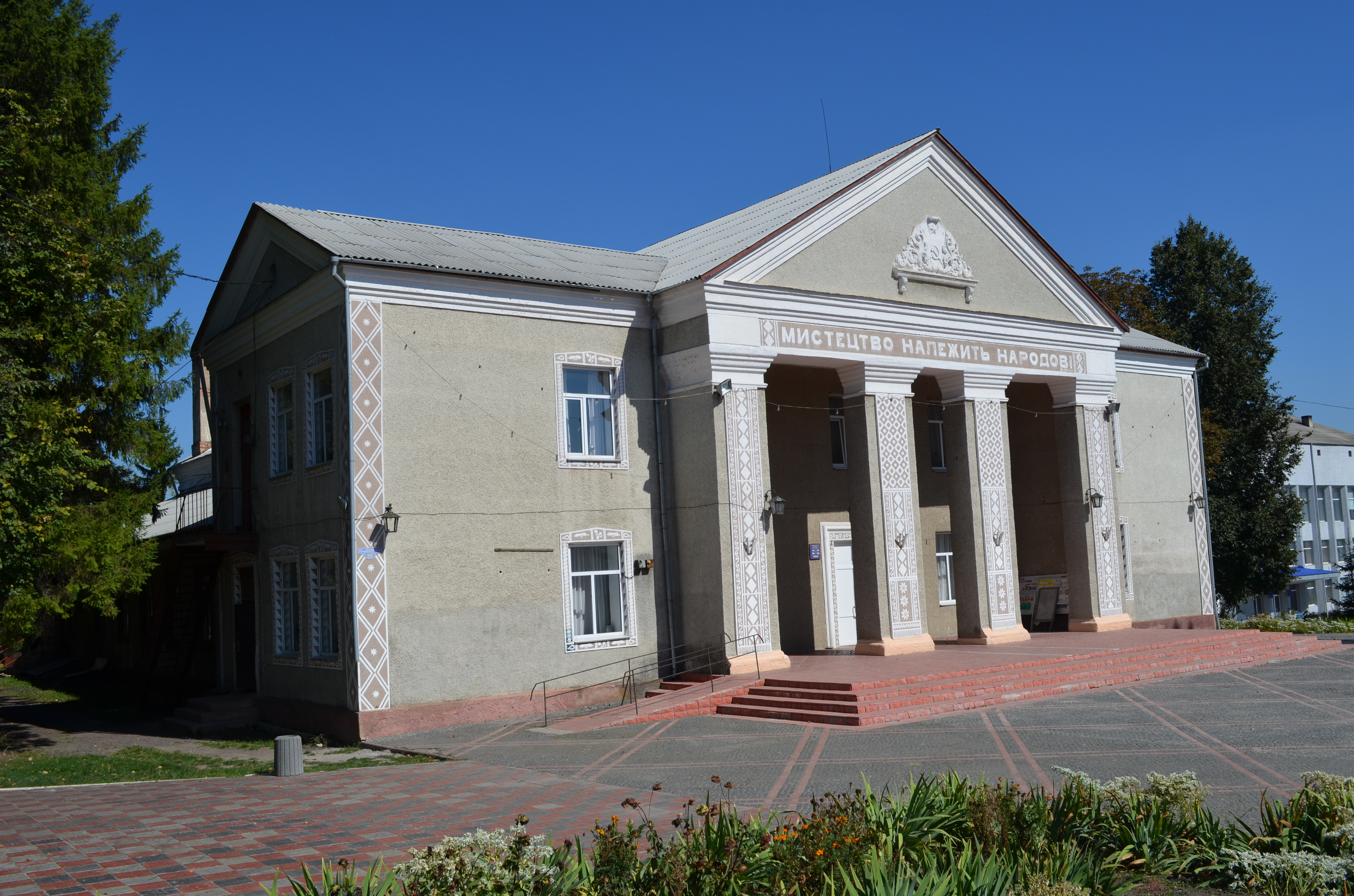 смт Піщанка. Будинок культури.